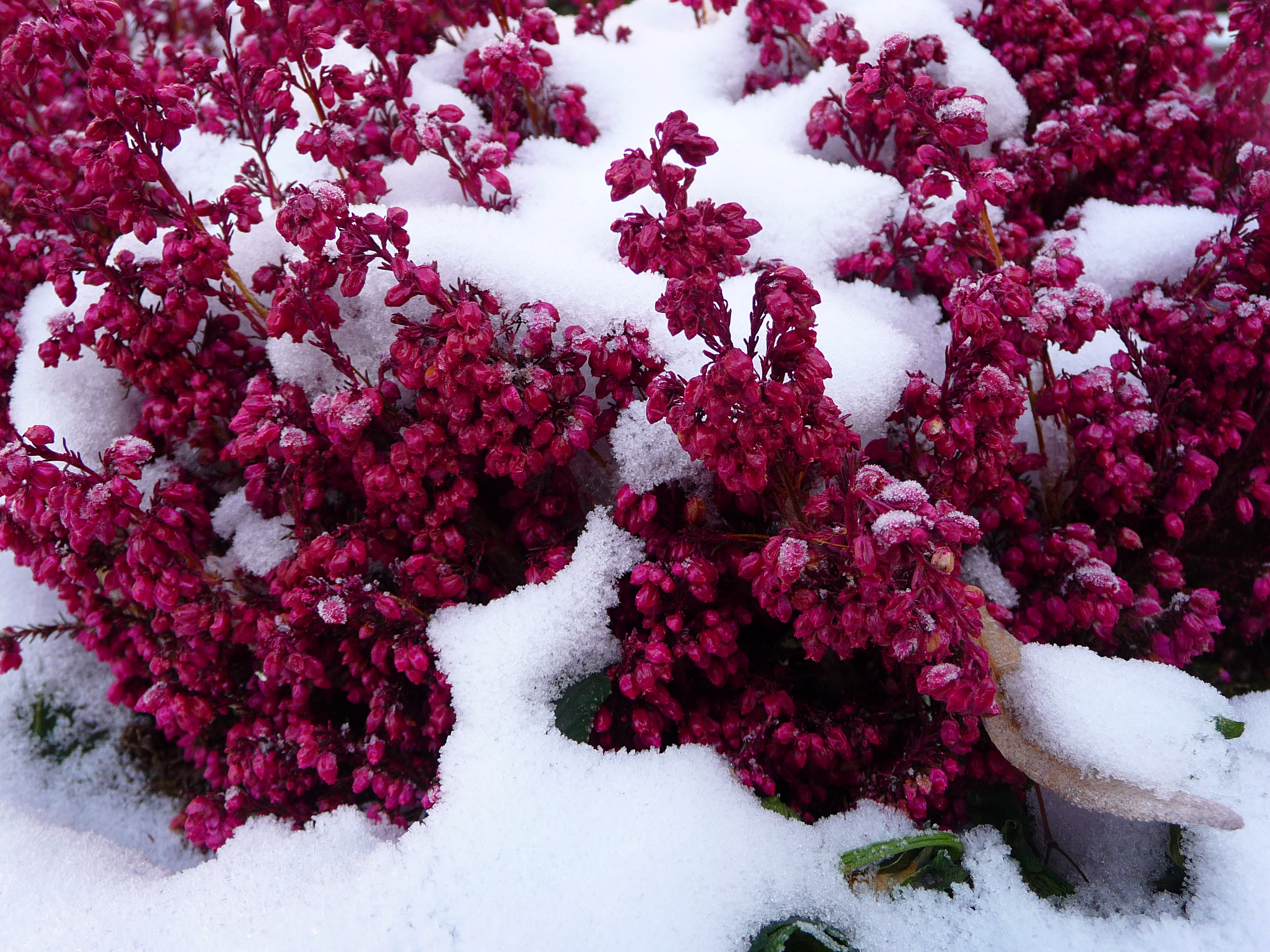 Blühende Erica im Schnee